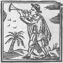 Tret d'una auca set-centista de manera que qualsevol dret d'autor ha d'haver caducat per nassos